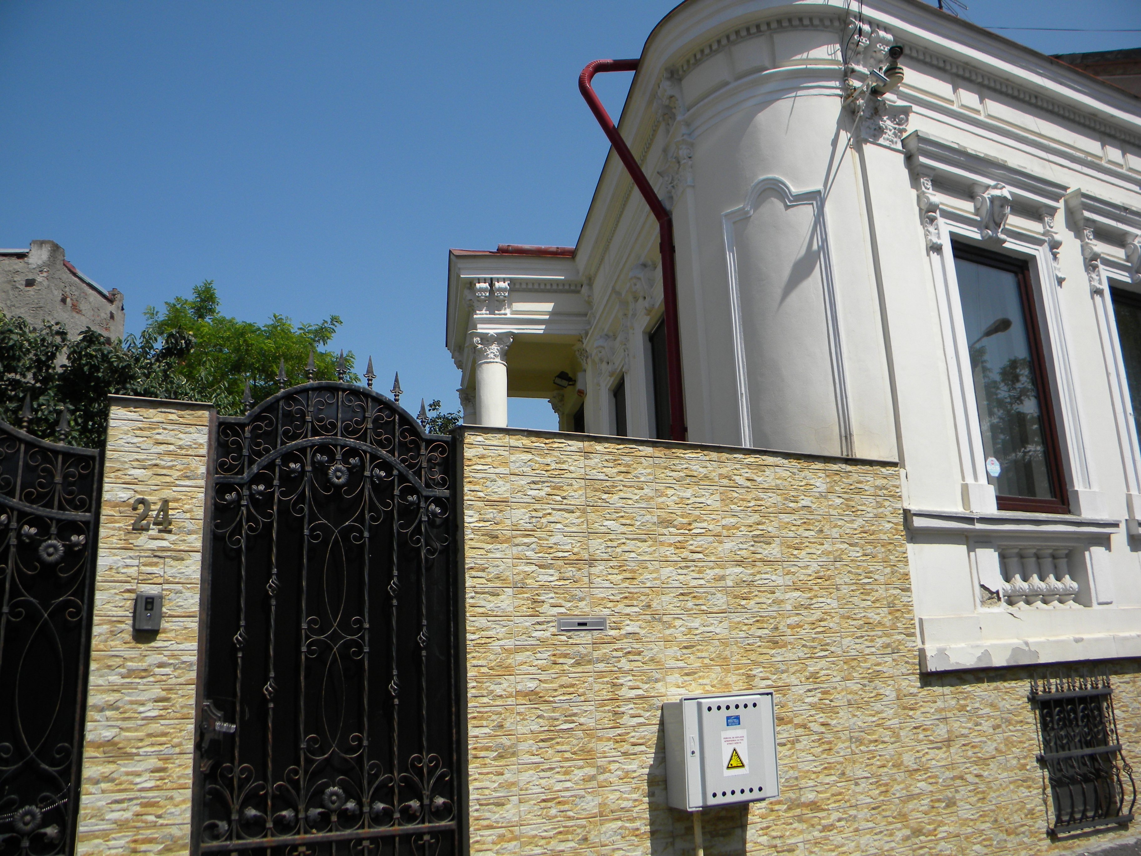 Bucuresti, Romania, Casa pe Str. Parfumului nr. 24; B-II-m-B-19340 (detaliu)